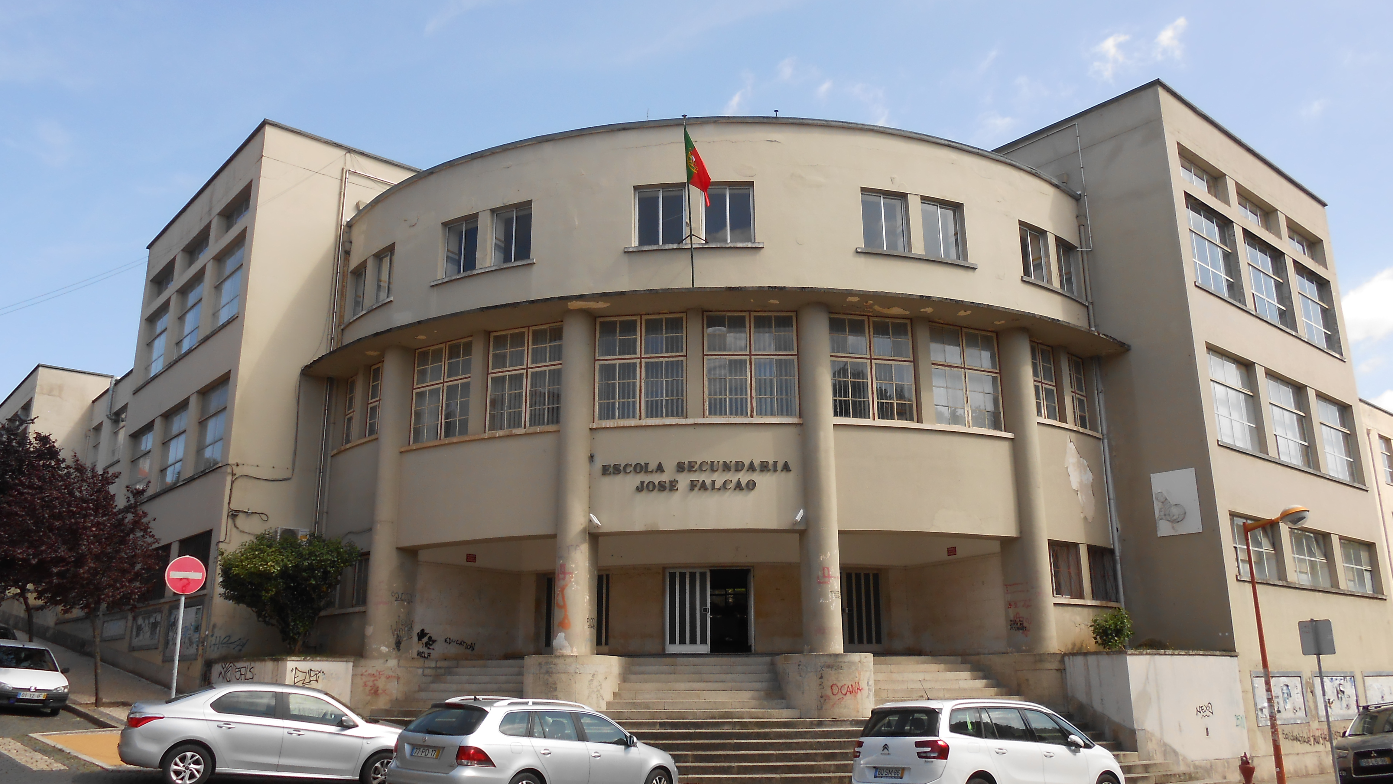 Escola Secundária José Falcão.